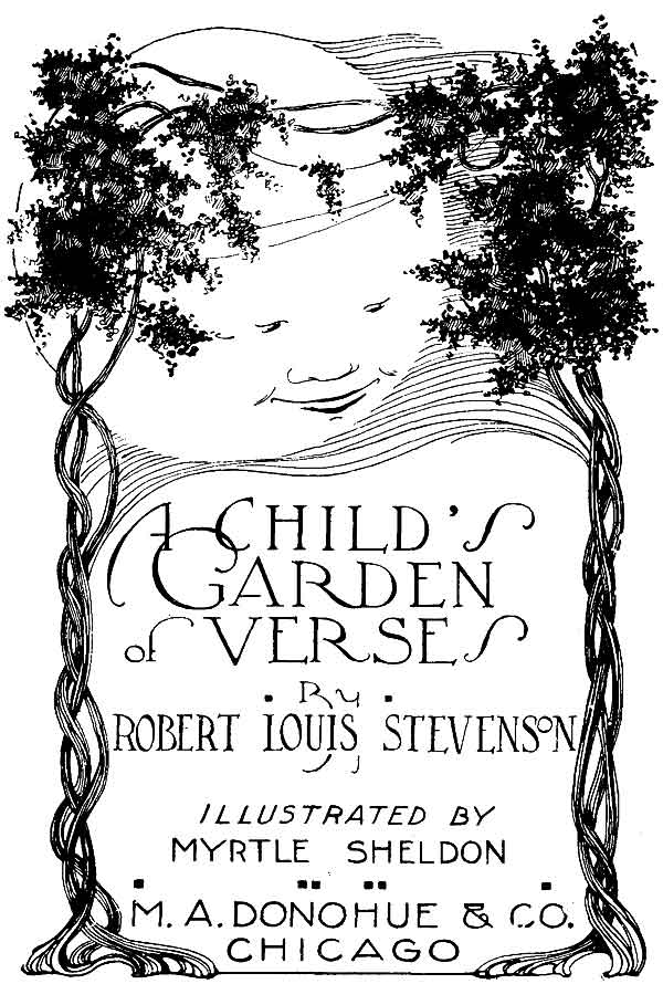 Titelbild zu "A Child's Garden of Verses"